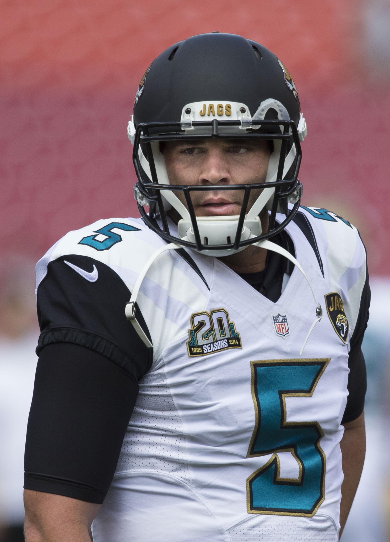 Blake Bortles Jaguars at Redskins